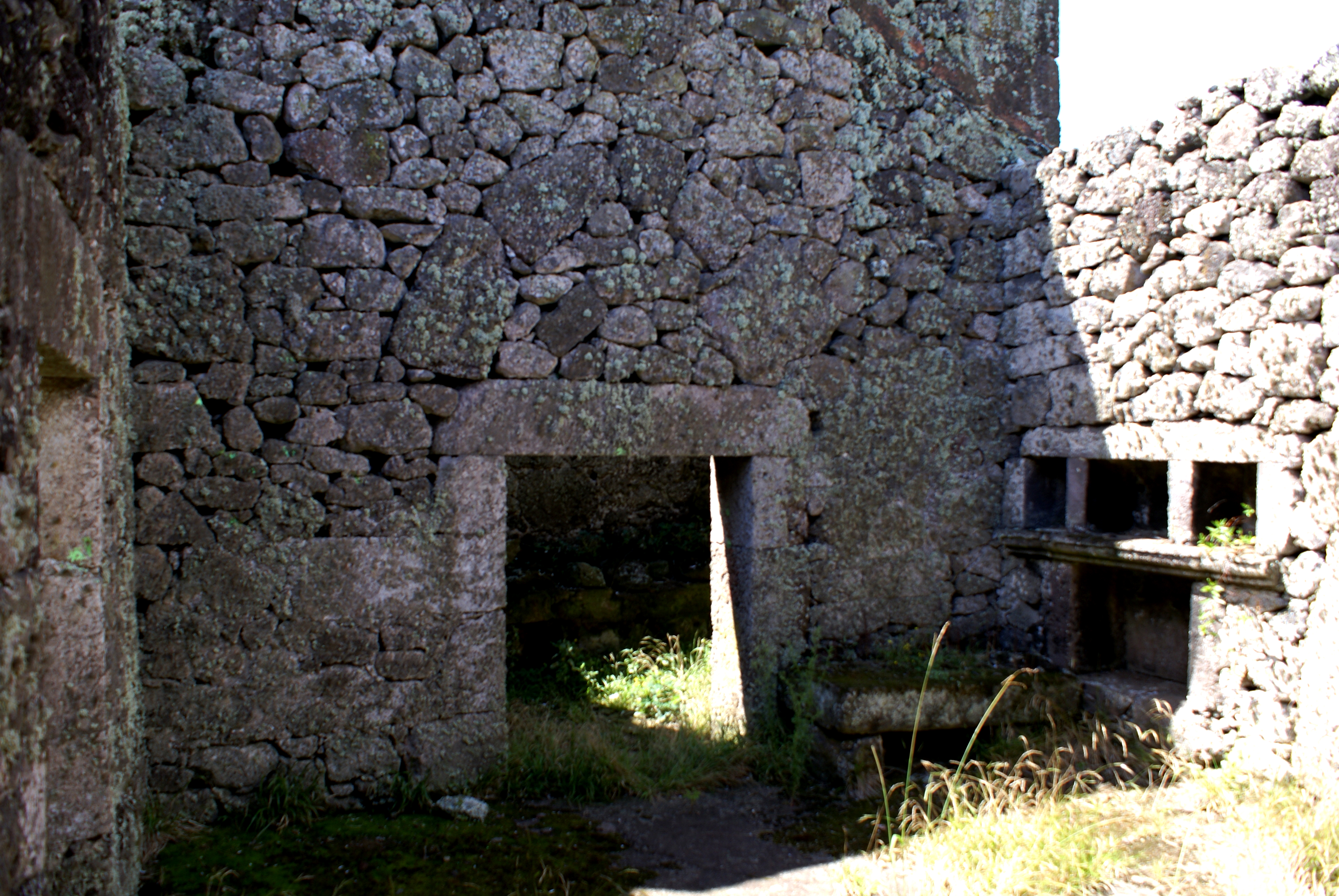 Solar dos Tiagos, ruínas do interior, Topo, Calheta, ilha de São Jorge, Açores